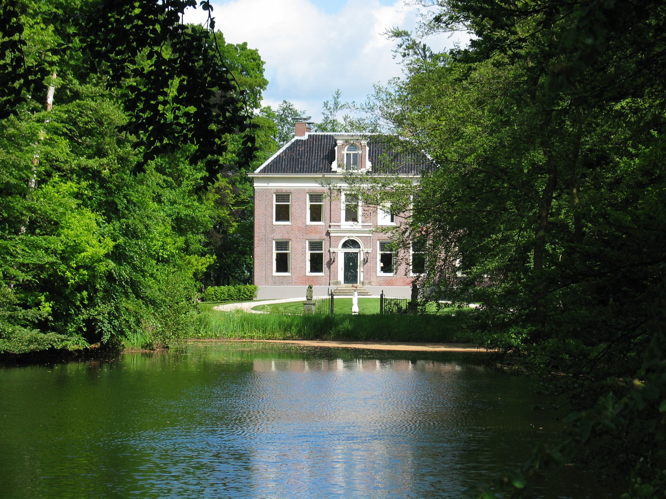 Landgoed Vennebroek. De foto is op 15 mei 2004 gemaakt door H. de Vegt.